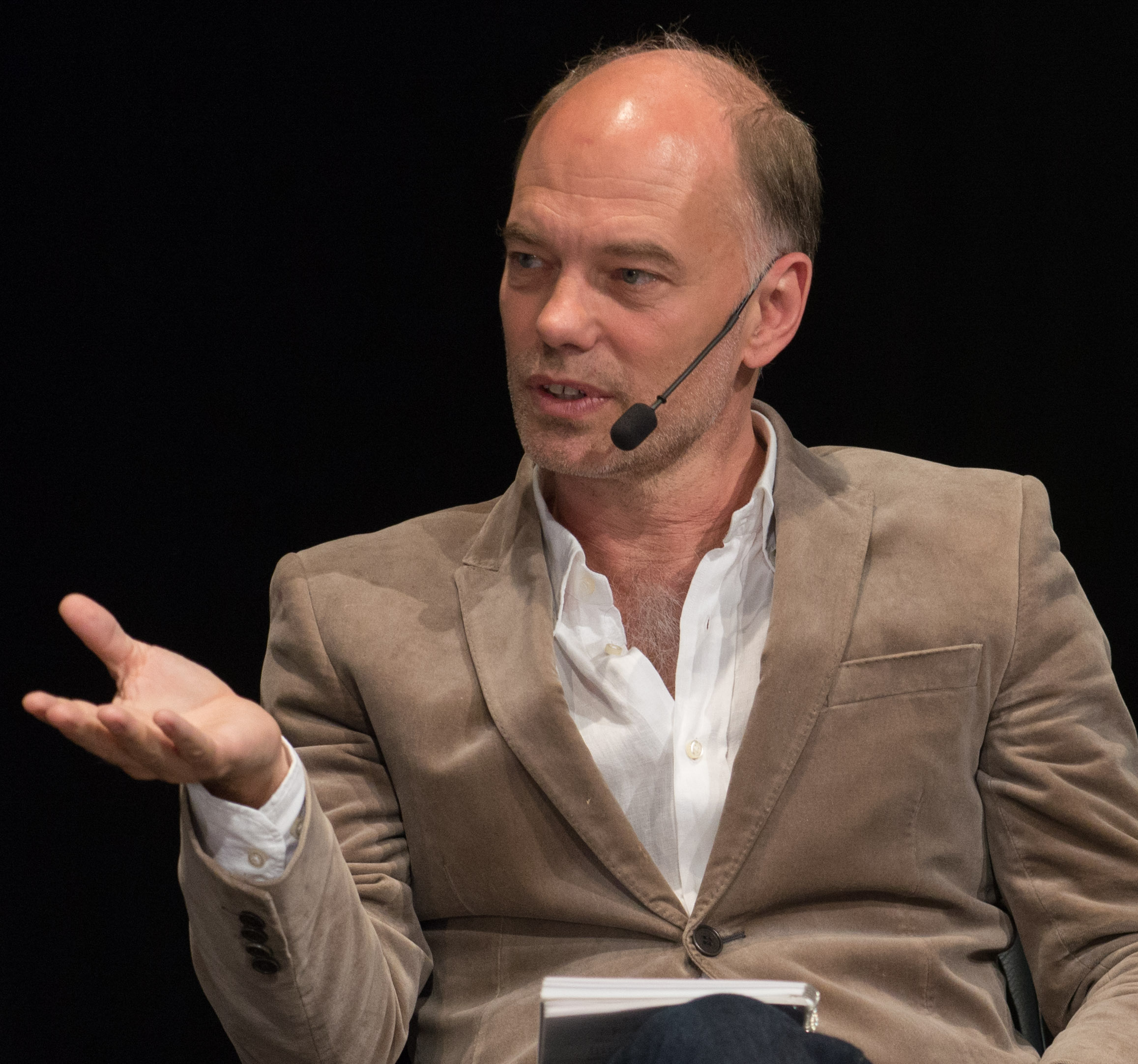 Niklas Hjulström på Gannevik Talks på Kulturhuset i Stockholm den 24 maj 2015.